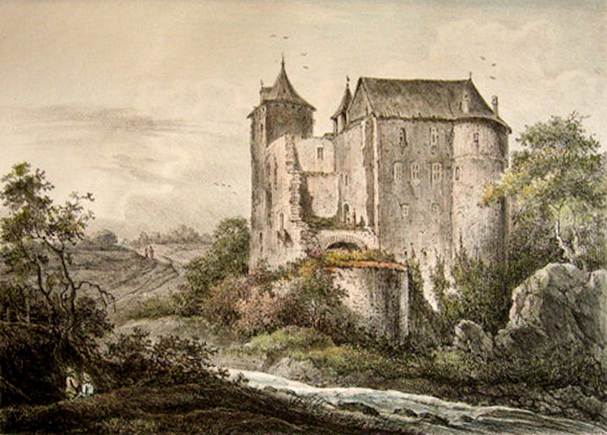 Tekening van kasteel Schimper